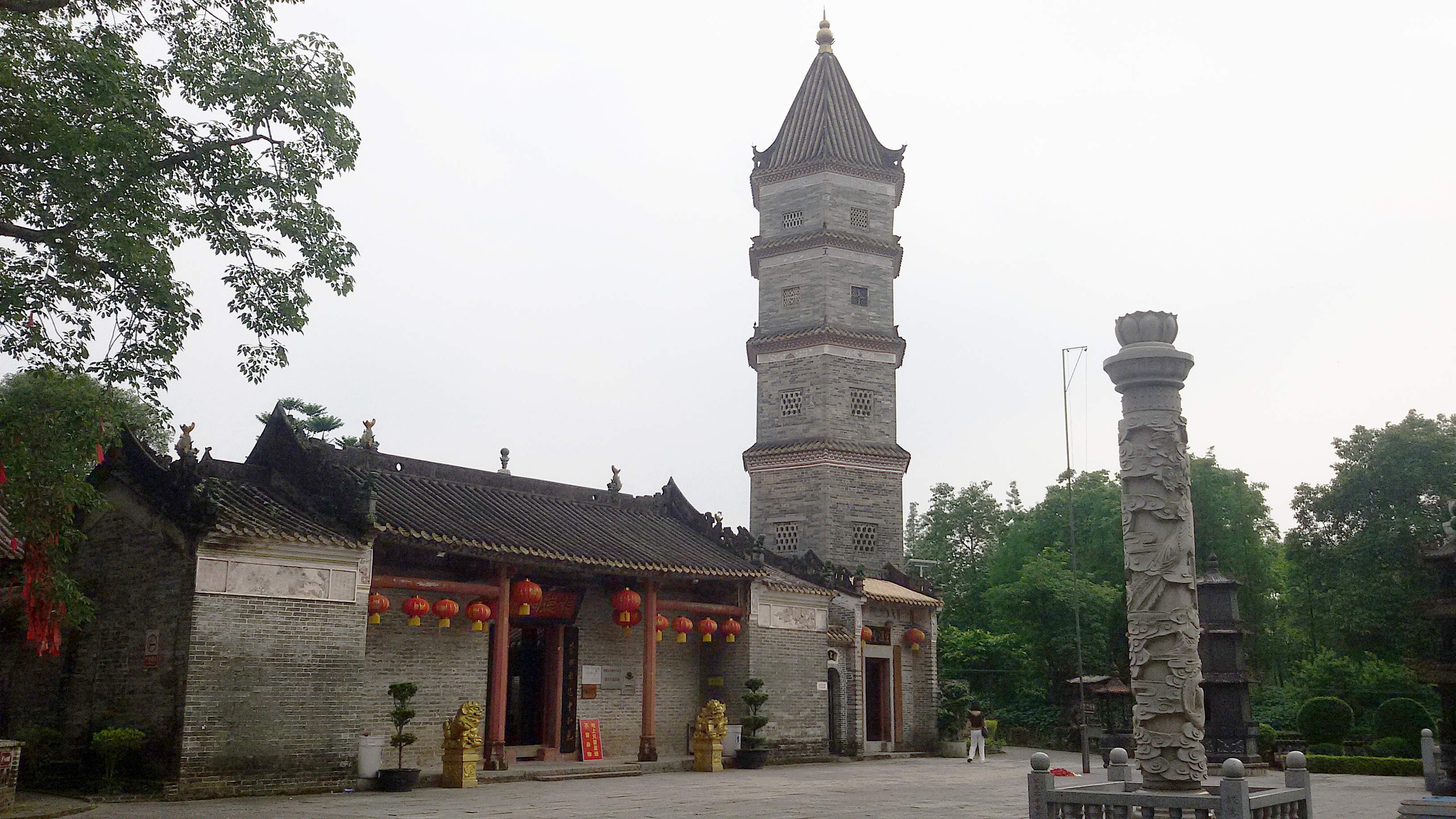 粵語: 小樓人家嘅匯康閣景區